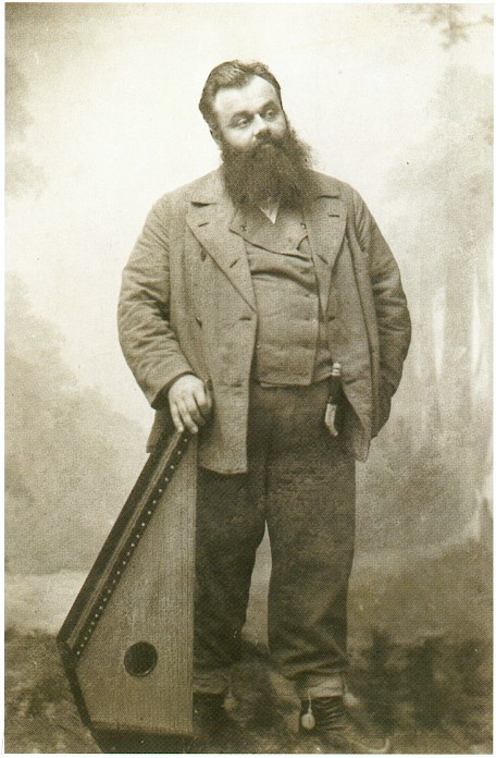 Pasi Jääskeläinen suomalainen kanteleensoittaja